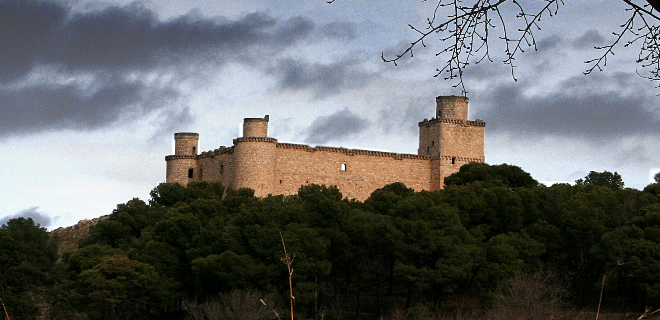 Castillo de Barcience (provincia de Toledo, Castilla-La Mancha, España).